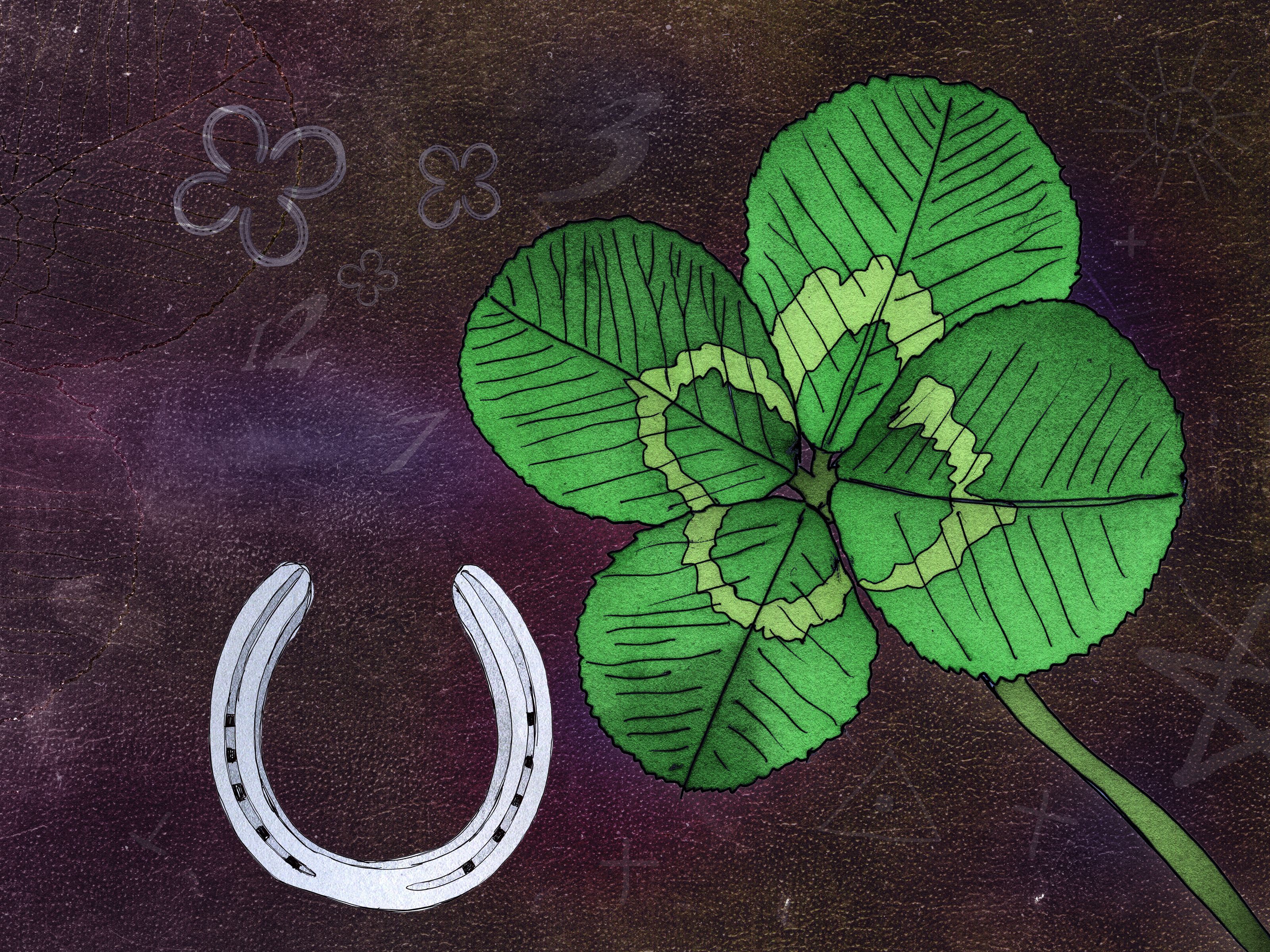 Utställningsbild (originalfil; blandteknik med tecknade och skannade element) skapad av konstnären Gunnar Creutz till folktroutställningen Skräck & skrock vintern 2012-2013 på Falbygdens museum i Falköping. Bilden visar föremål (en hästsko och en fyrklöver) som ger tur. Fyrklövern är tecknad efter ett foto av en fyrklöver av Schnobby. I bakgrunden skymtar olika tursamma, lyckobringande eller nyttiga symboler och tal. Den uppladdade filen är originalfilen, som utställningsbilden skrevs ut från.